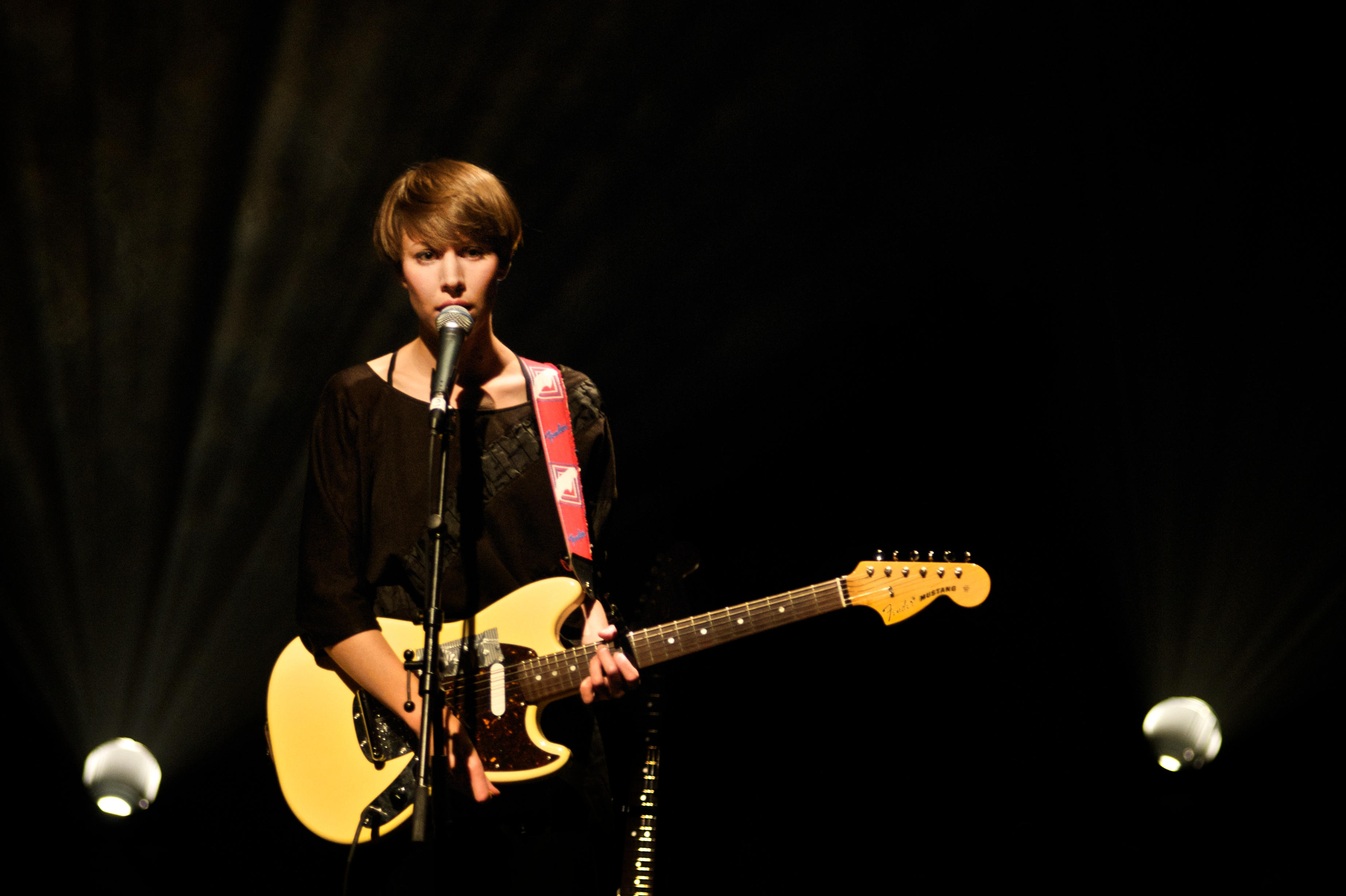 Invasão Sueca - Show realizado no SESC Pompéia, dia 24 de Setembro de 2009.